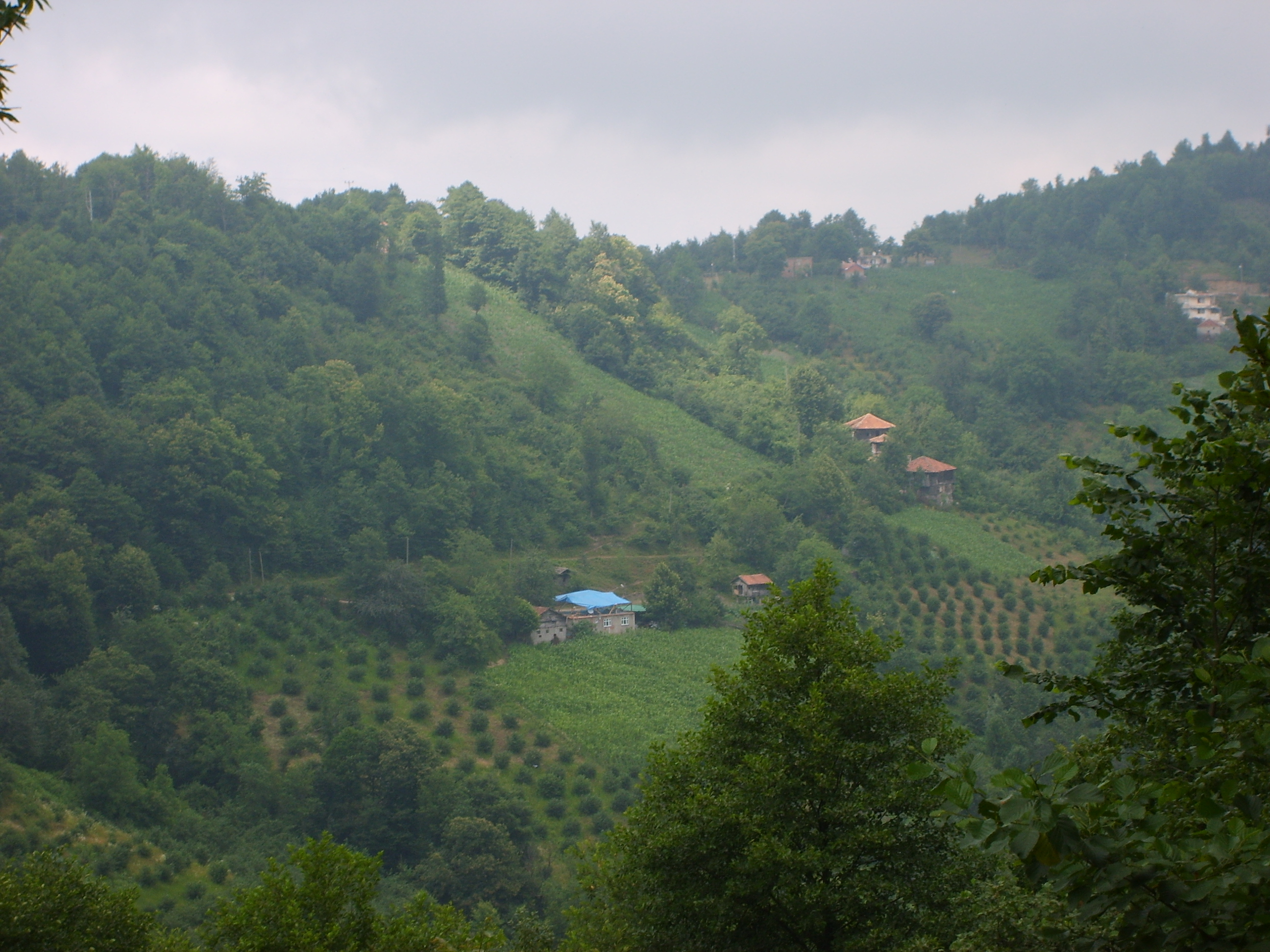 General view of the Kozluk neighborhood of Akbaba village